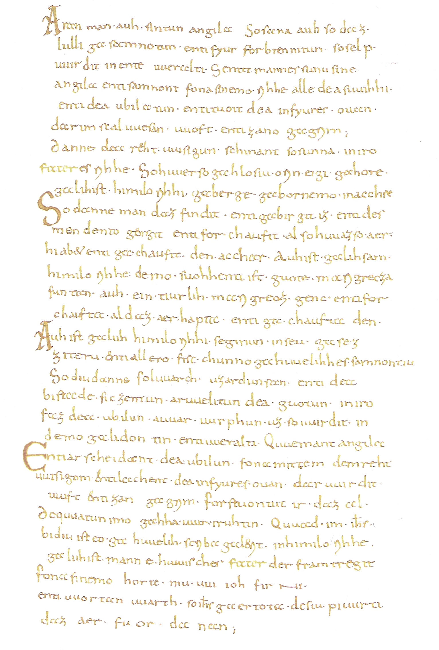 Mondseer Matthäus, Kapitel X